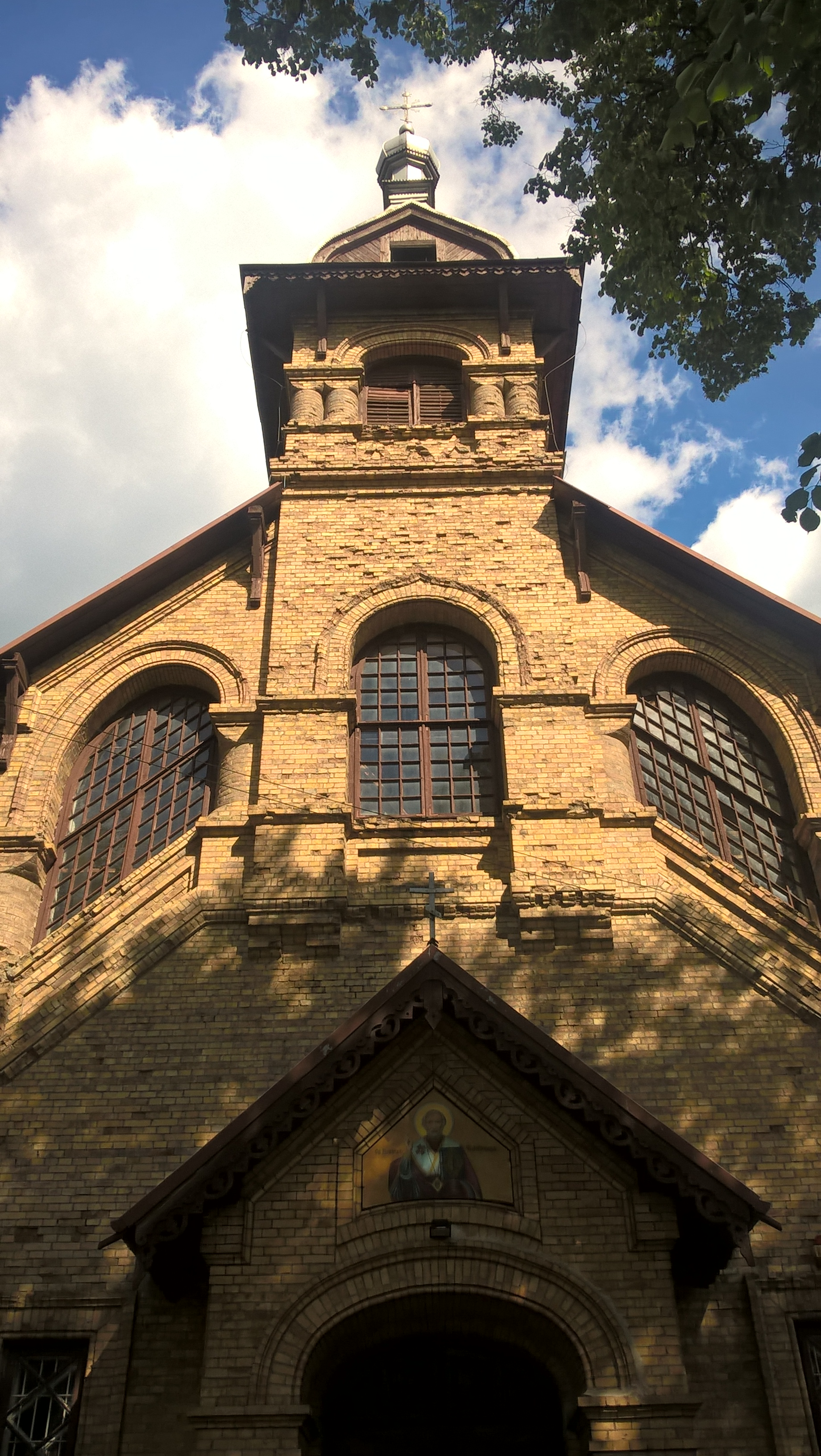 Cerkiew św. Mikołaja w Zabłociu